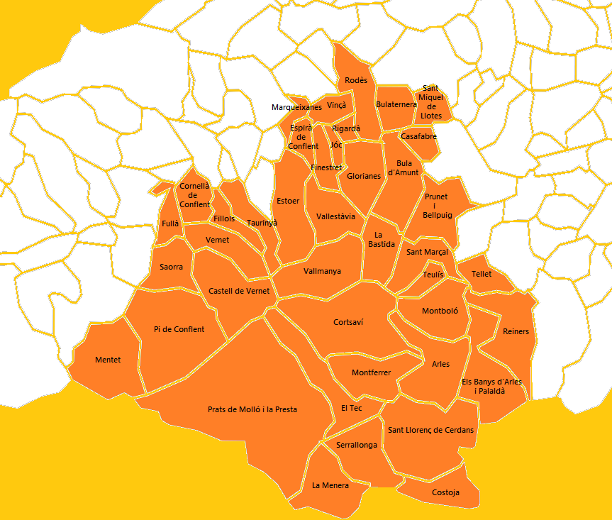 Mapa del Cantó del Canigó elaborat a partir d'un mapa de lliure distribució